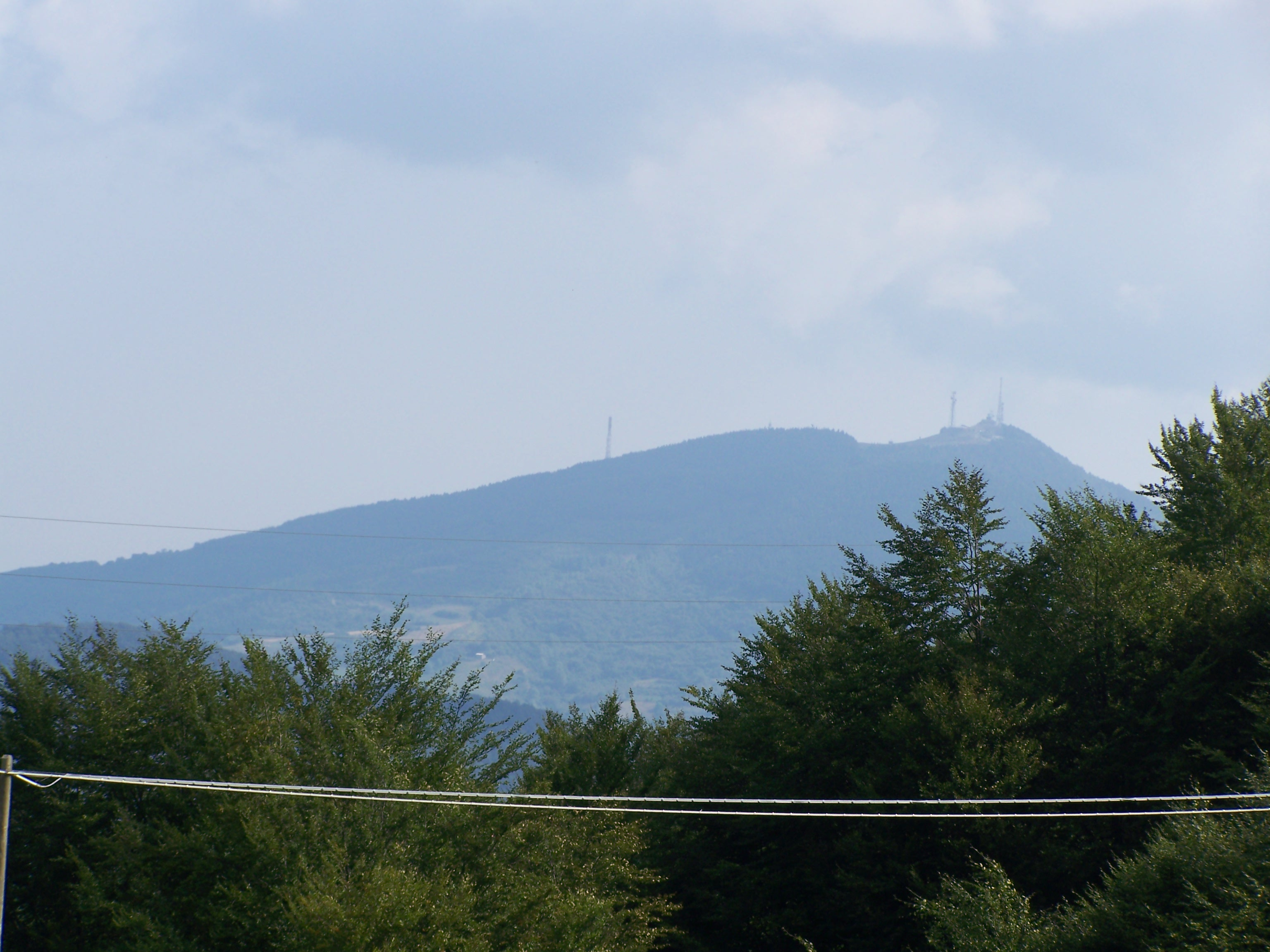 Il monte Penice visto da Cima Colletat (Frazione di Brallo di Pregola)